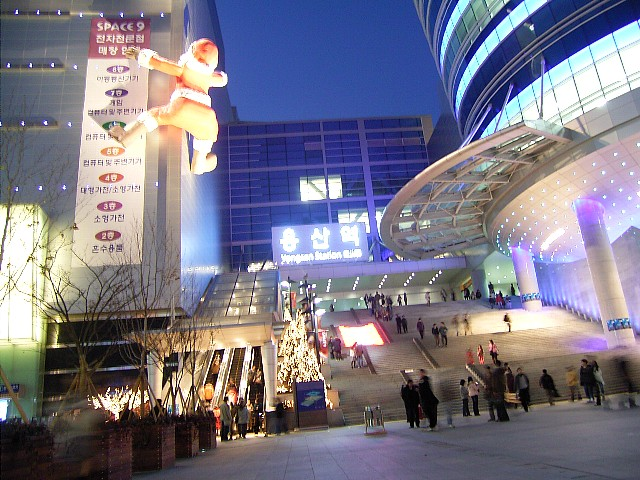 龍山駅。電気街です。